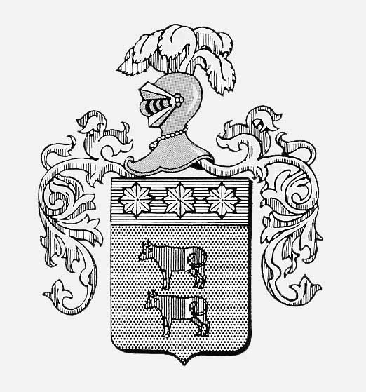 La familia Carrera es una familia chilena originaria del País Vasco en España, radicada en Chile desde el siglo XVII, que tuvo una destacada participación pública durante el siglo XIX, principalmente durante la independencia de su país. Su fundador y genearca fue Juan Ignacio de la Carrera Yturgoyen, quien se radicó en Chile en 1639, casó en 1655 con Catalina de Elguea y Cáceres, (tataranieta de Diego García de Cáceres) con quien tuvo 10 hijos, además tuvo otros tres hijos naturales antes de casarse.